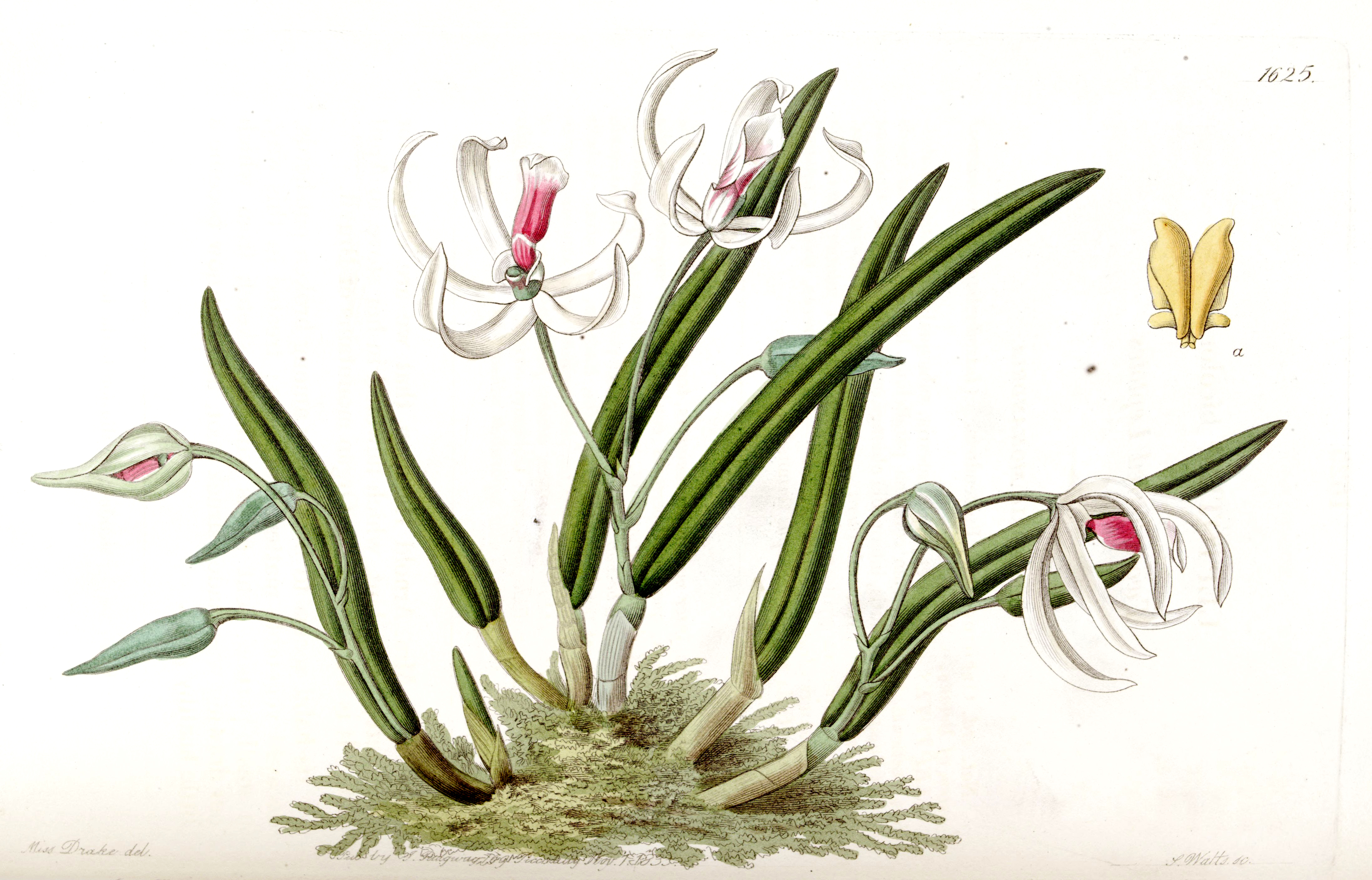 Leptotes bicolor